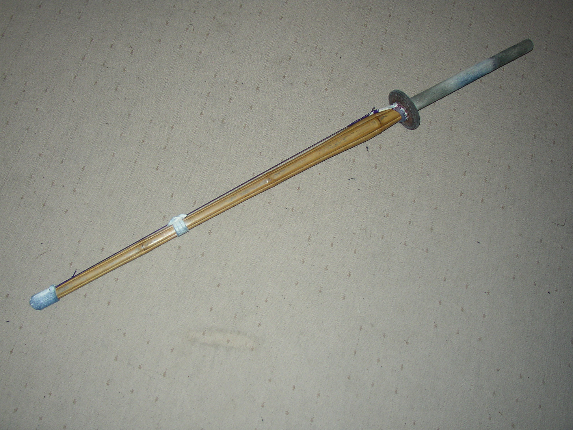 Foto van shinai uit eigen collectie